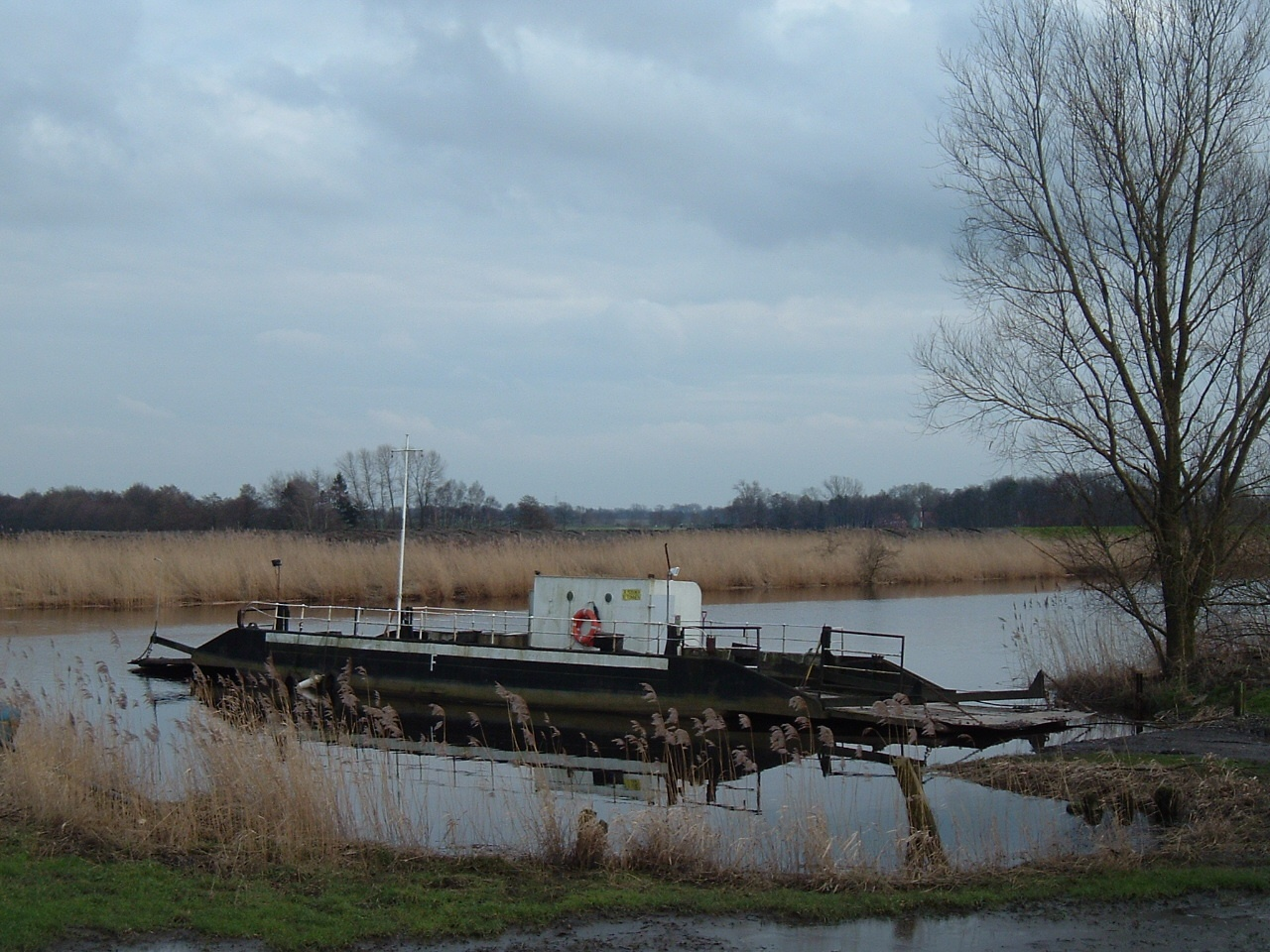 De Fähr in Brobargen. Vun’n Fährkroog ut na Süüdoost keken.